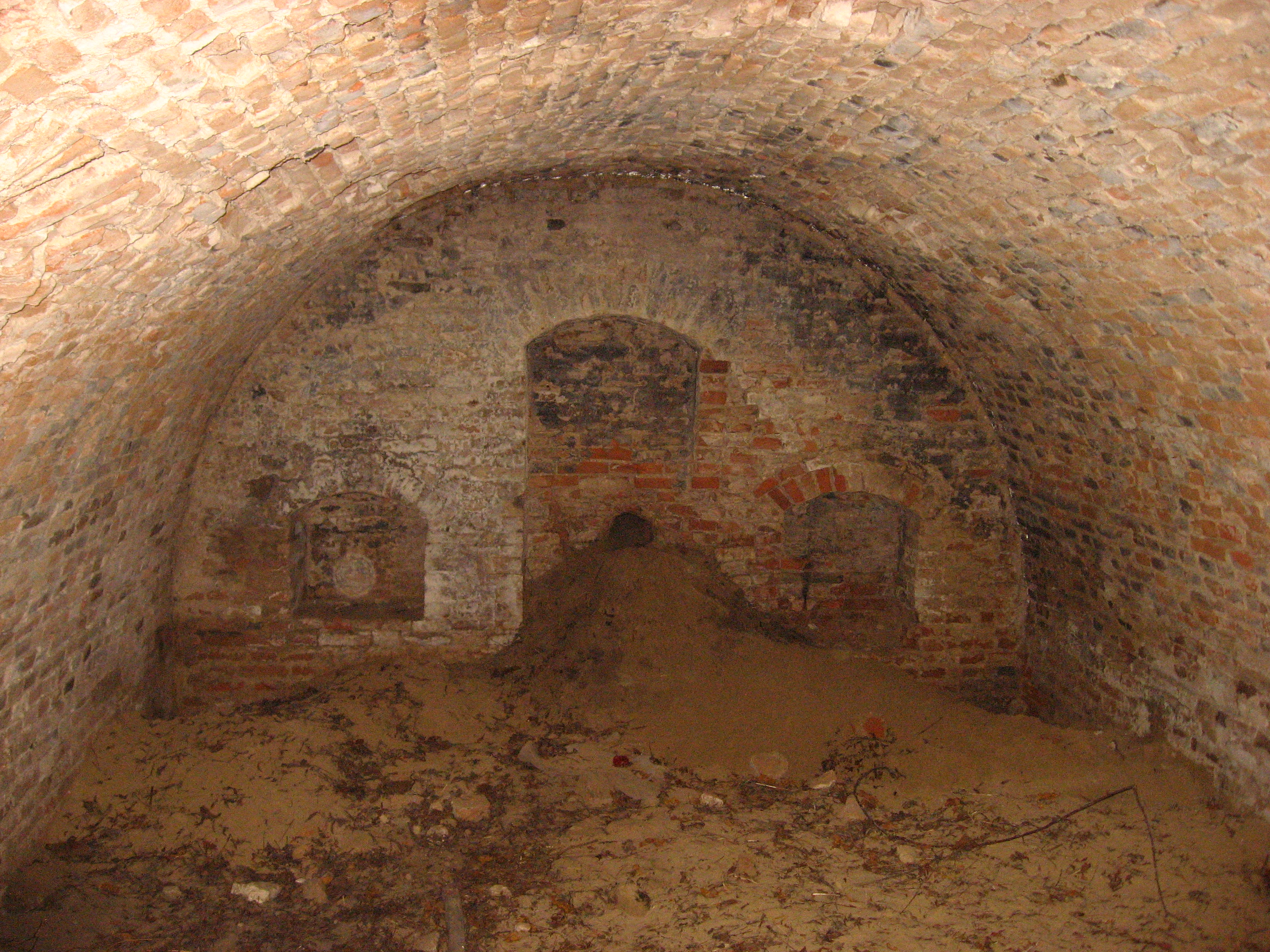 Obrowiec, dawna piwnica dworska